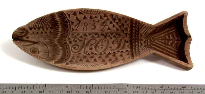 Smørfisk med skåret datering 1854 og initialene KOD fra Rissa i Sør-Trøndelag. Foto: Anne-Lise Reinsfelt / Norsk Folkemuseum.